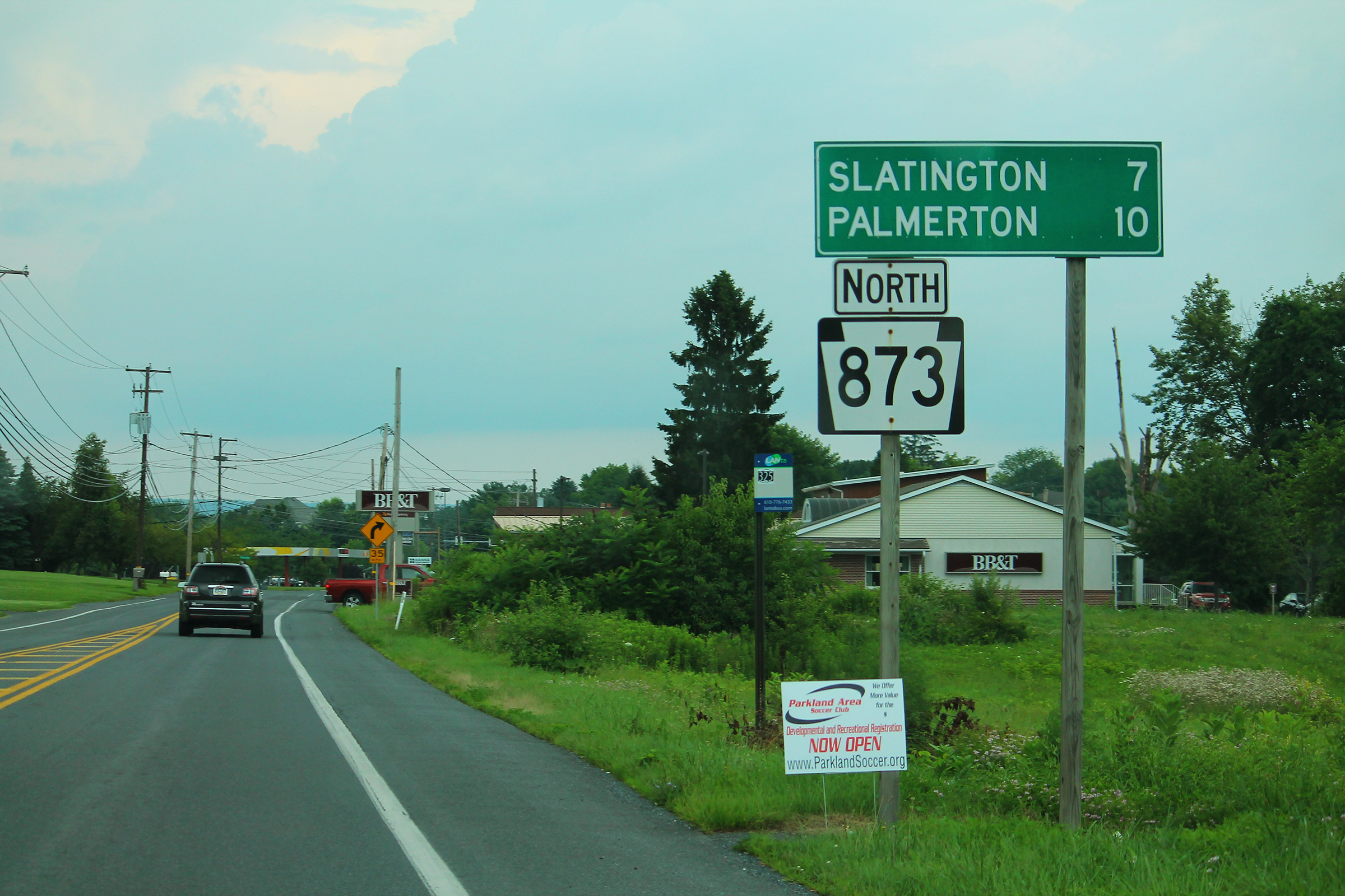 PA873nRoadSign